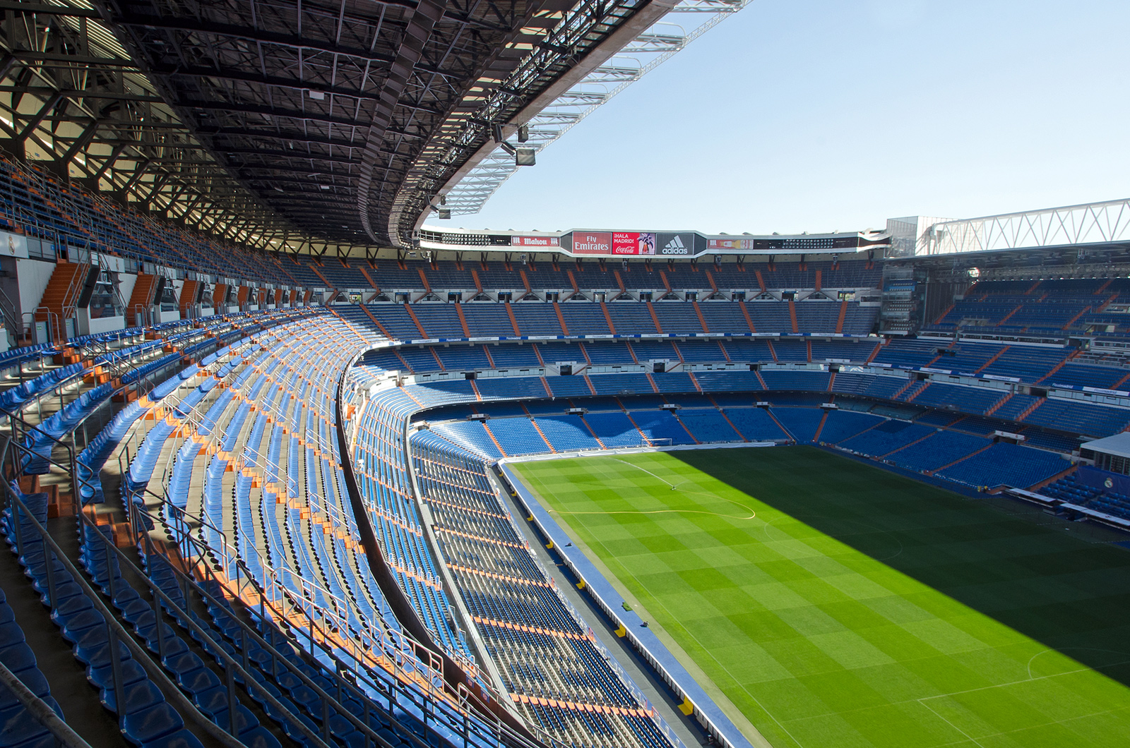 Santiago Bernabeu Stadium